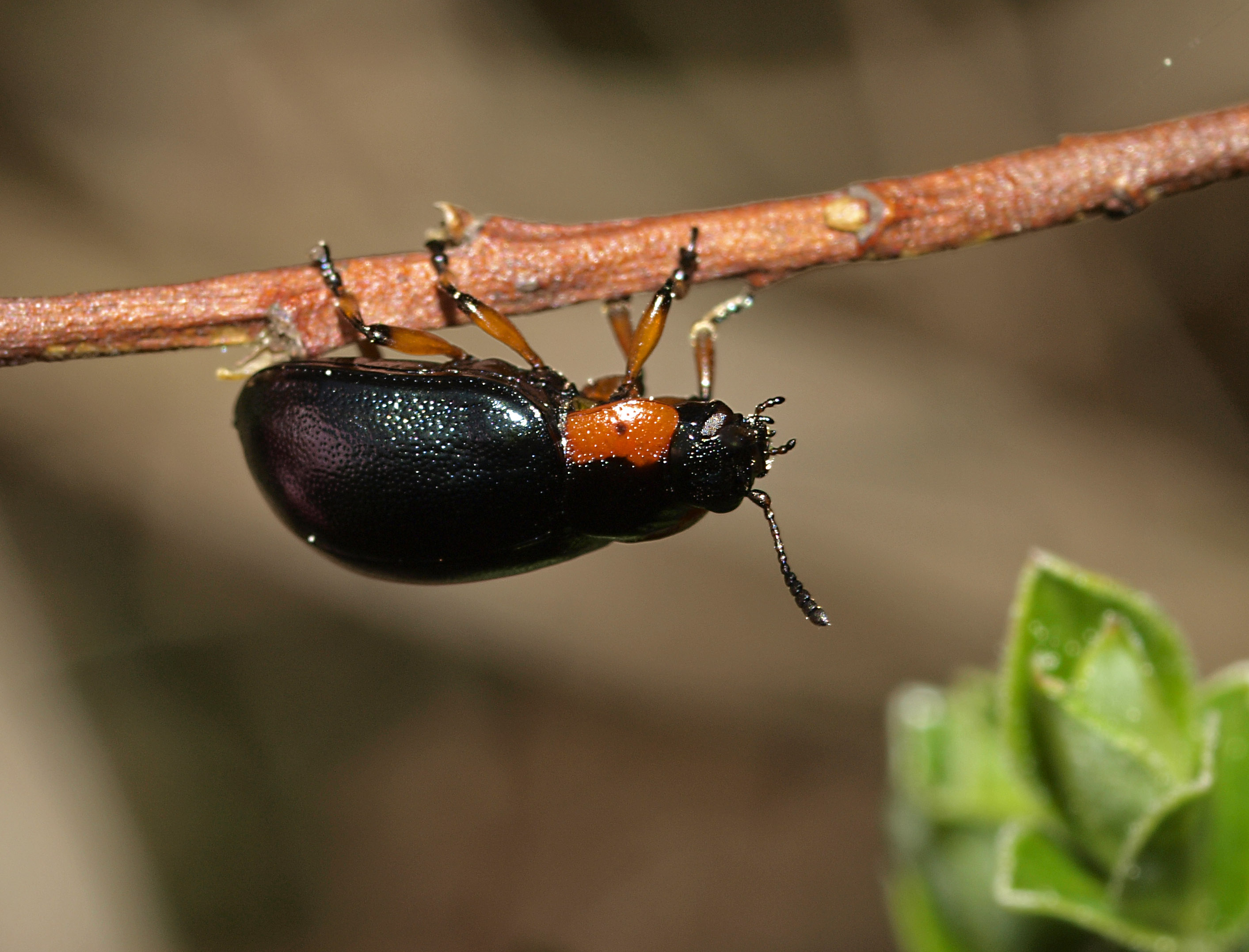 Klitbladbille.